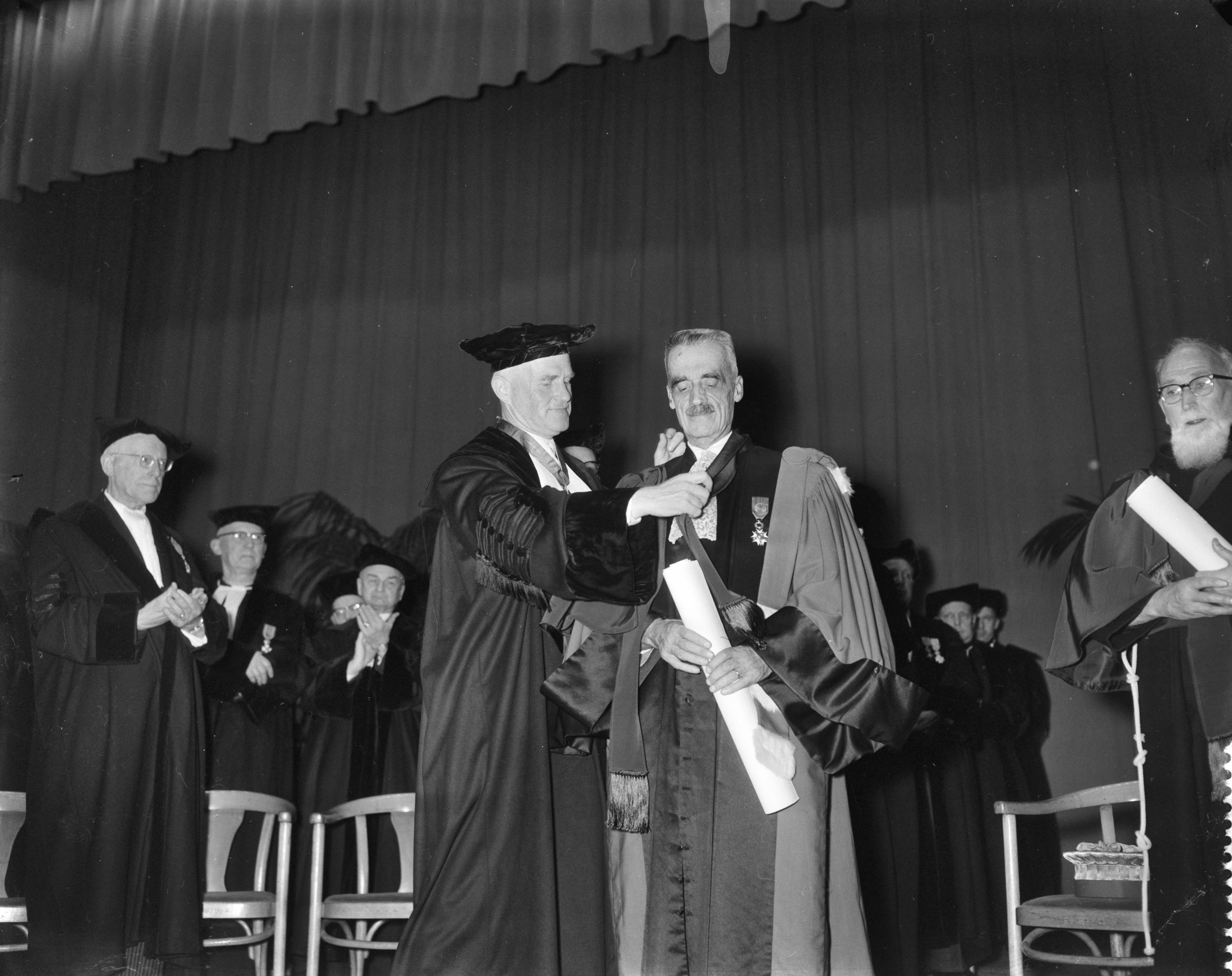 Prof. dr. J.H. Terlingen (1902-1965) hangt de versierselen van de eredoctor om bij Prof. René Savatier (1892-1984). Rechts eredoctor pater Maximilianus OFM Cap (=Petrus Josephus Maximiliaan van Dun, 1884-1963). Katholieke Universiteit Nijmegen, Nederland, 10 november 1958